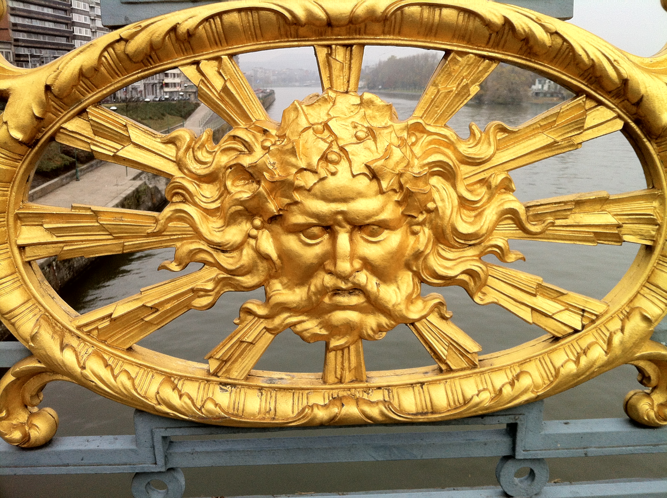 Garde-corps du pont de Fragnée